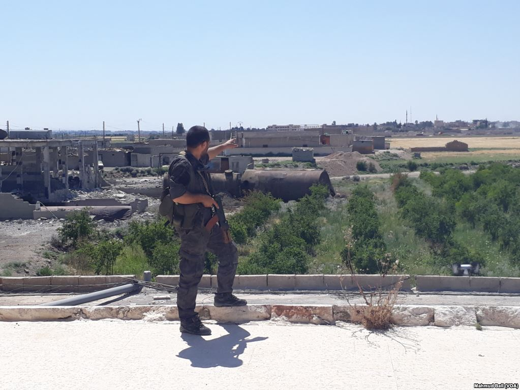 Membres des Forces démocratiques syriennes à Raqqa, en juin 2017.